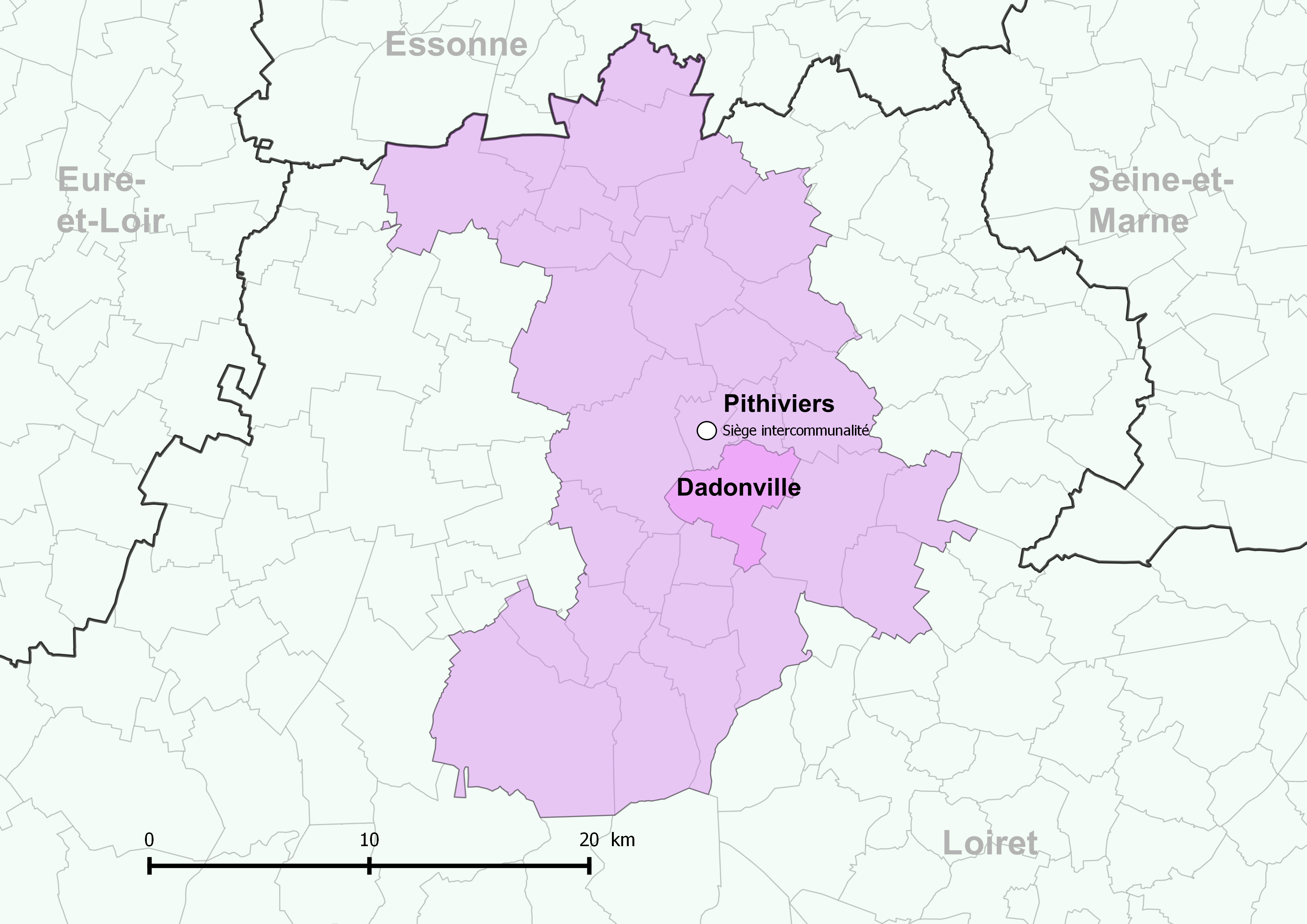 Périmètre de la communauté de communes du Pithiverais - Positionnement de la commune de Dadonville.